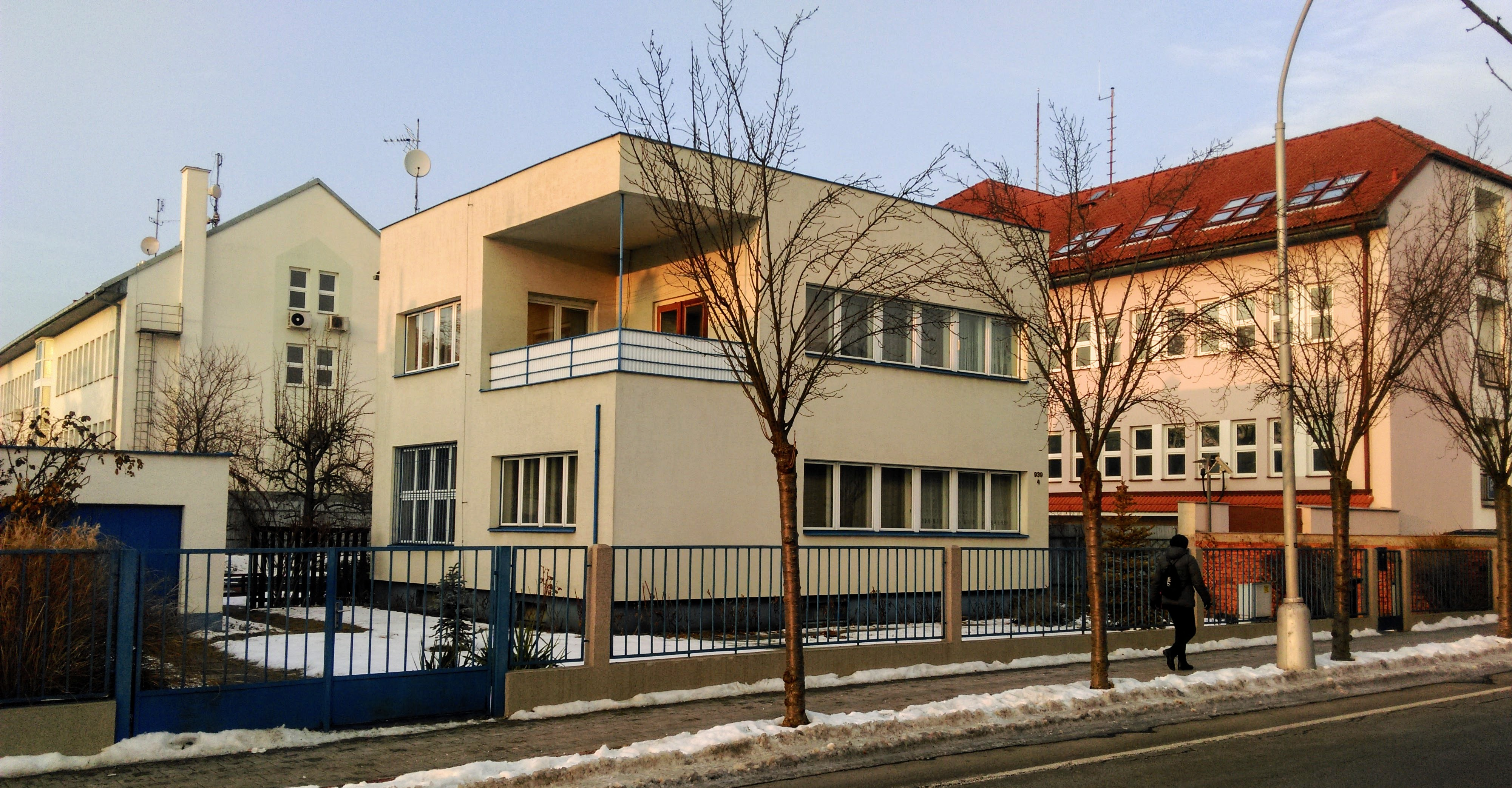 Kroměříž Březinova 939, vila postavená pro akademického malíře Eduarda Světlíka, podle návrhu architekta Josefa Poláška